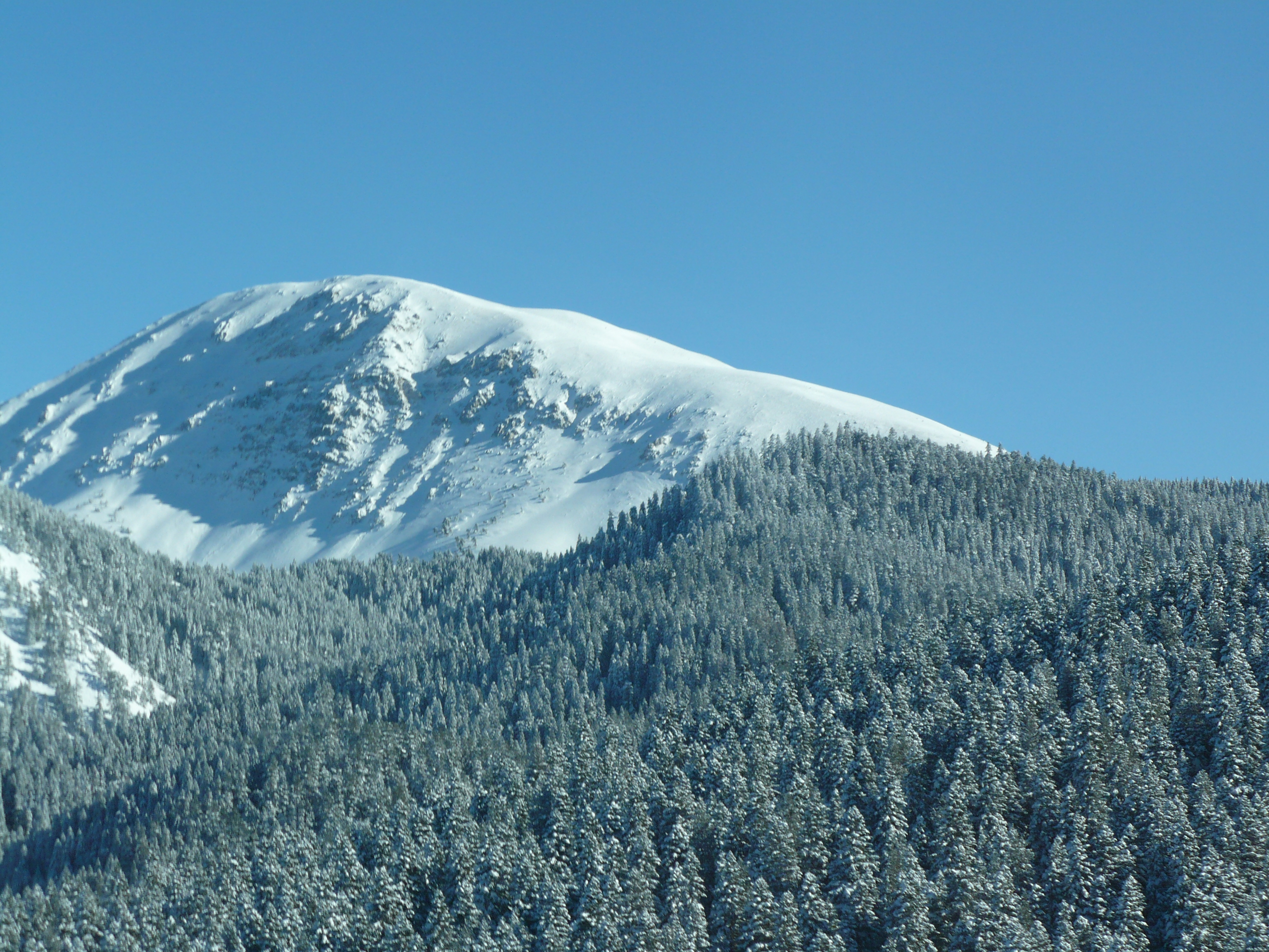 Ilgaz'dan bir görüntü